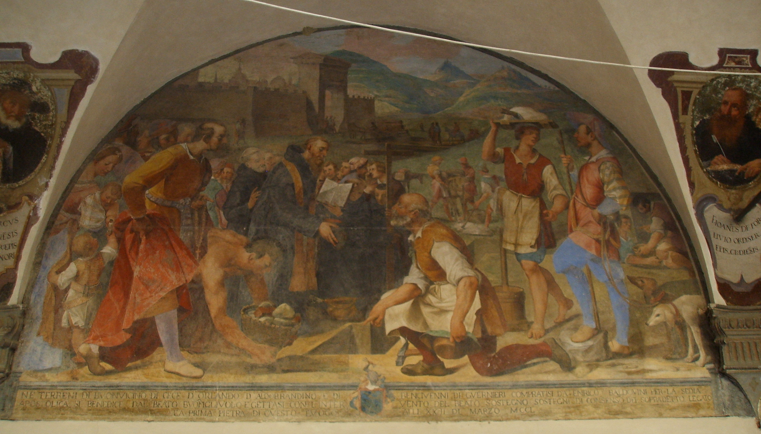 Santissima annunziata chiostro grande arsenio_mascagni,_posa_della_prima_pietra_di_s._maria_di_cafaggio in Florence, italy